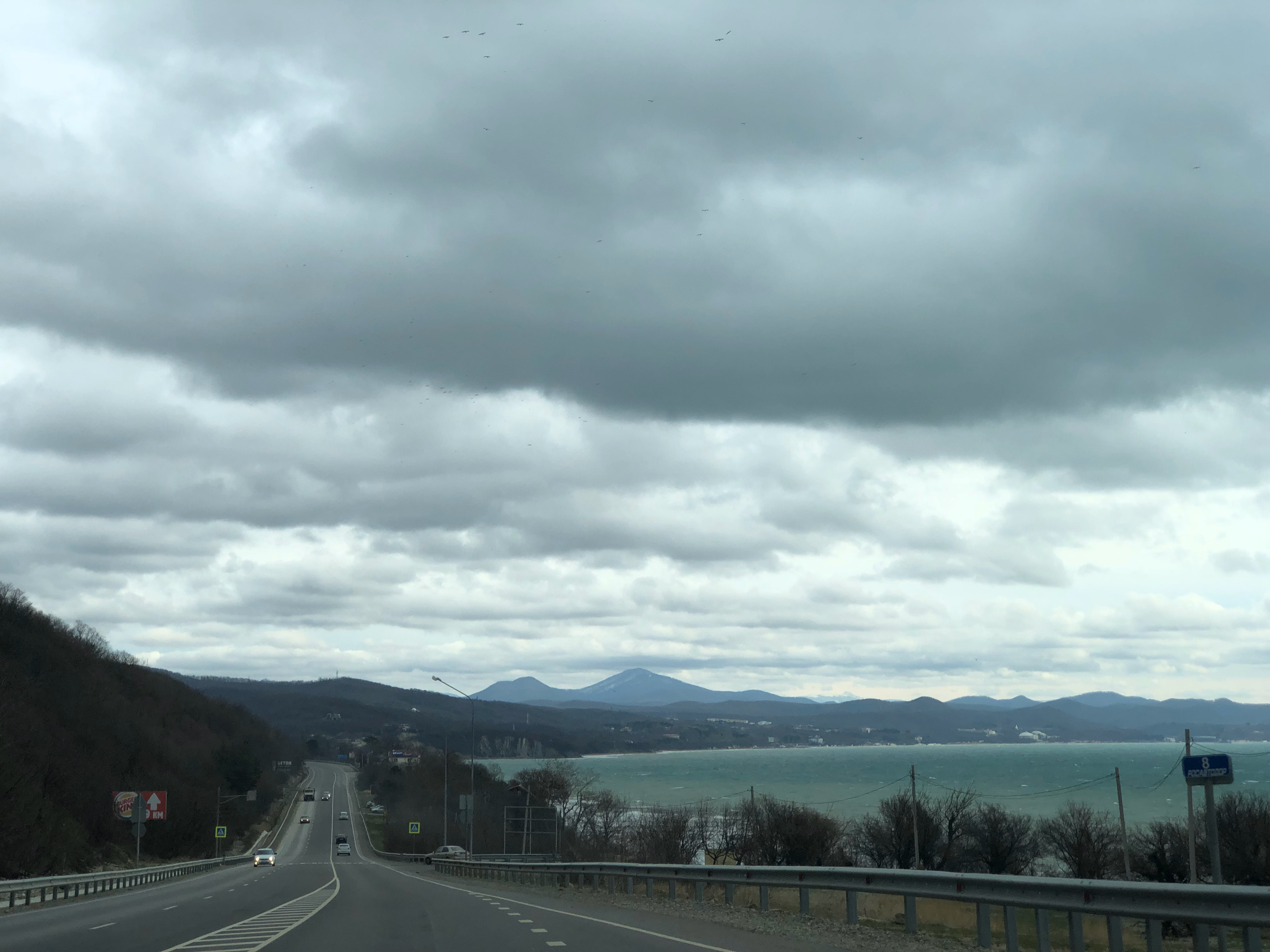 Черное море у Джубги